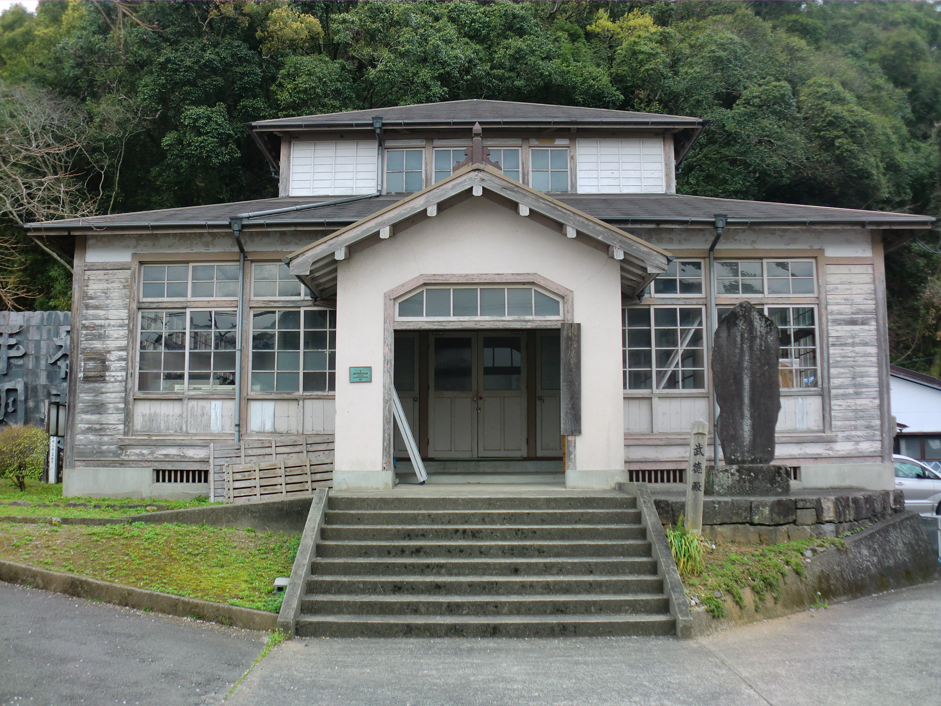 葦北郡芦北町にある武徳殿（登録有形文化財）